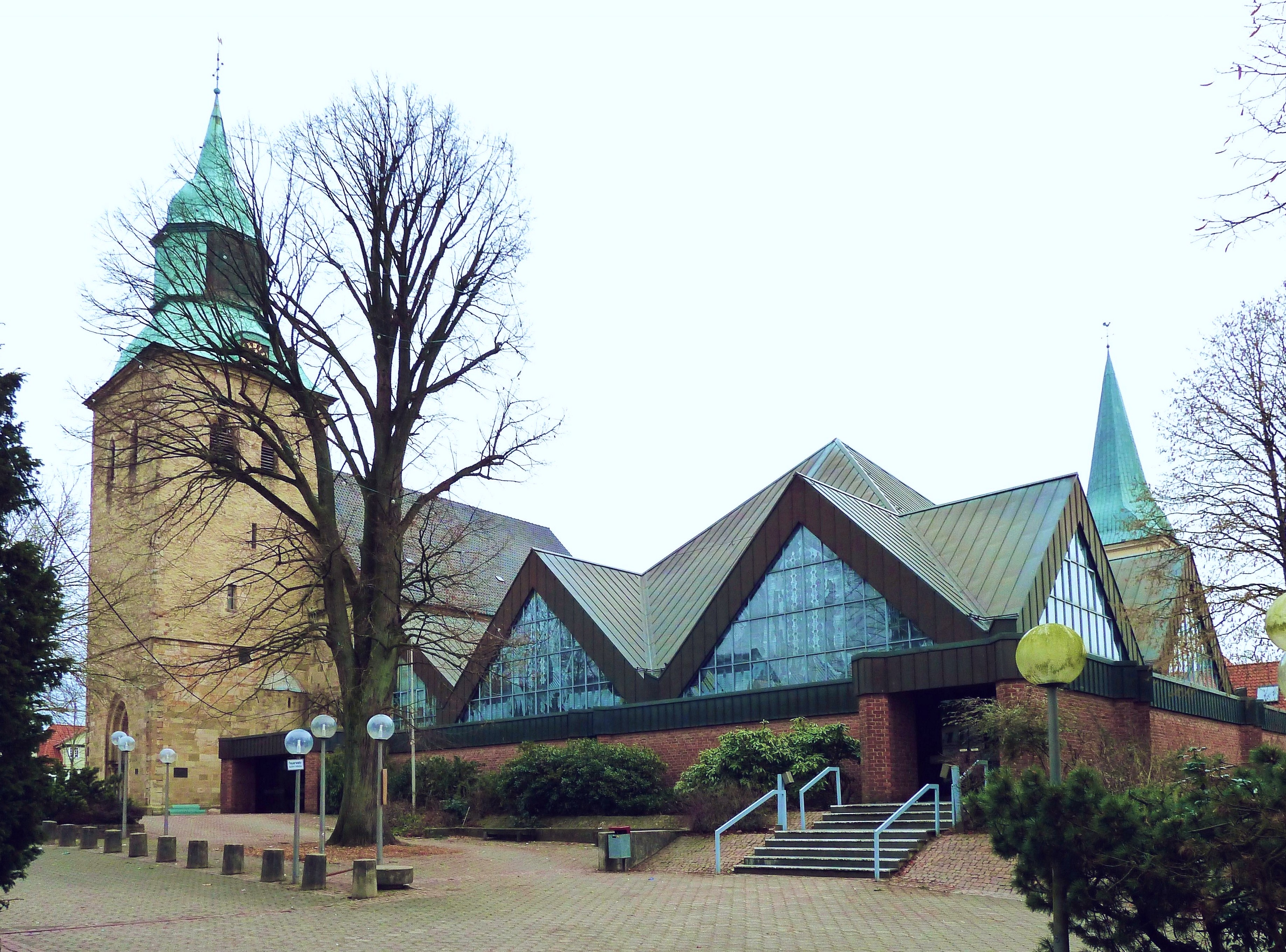 eigene Datei